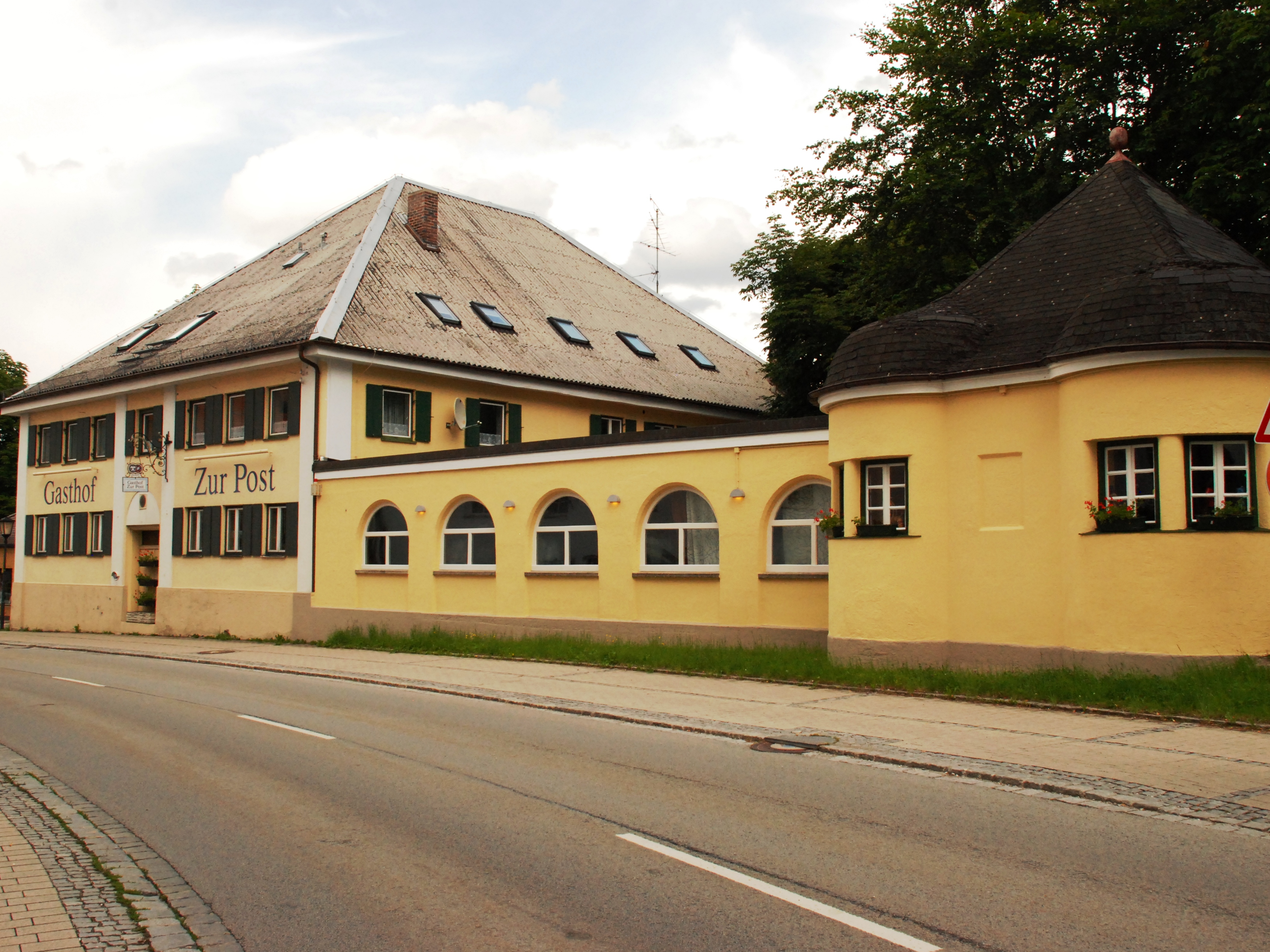 DE-BY. Als Baudenkmal in der Bayerischen Denkmalliste unter Aktennummer D-1-84-113-4 aufgeführt. Laut Denkmalliste Hauptgebäude in der zweiten Hälfte des 18. Jahrhunderts erbaut, Anbau mit Eckpavillon um 1920. Foto gemäß den Voraussetzungen zur Panoramafreiheit von öffentlicher Verkehrsfläche aus aufgenommen.